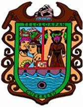 Para eleccion del Escudo se llevo a cabo un concurso cultural en el Municipio de Teloloapan, donde los temas la Tecampana, Los Diablos y Los Grijalbos.